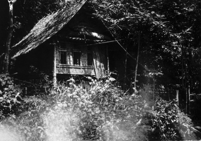 Foto. Een huis langs de weg bij Maros.